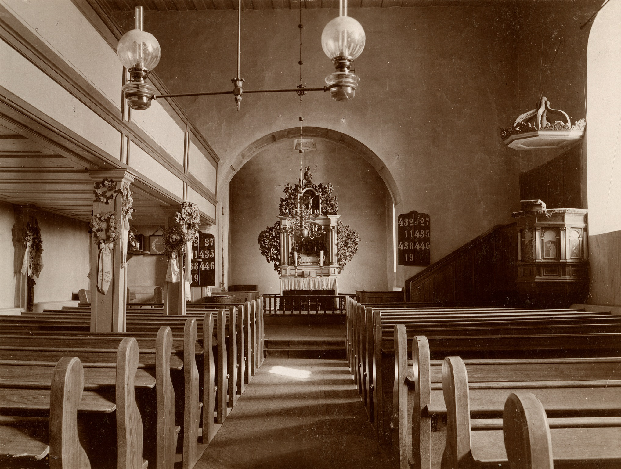 Interiør i Sørum kirke. Foto: Olaf Martin Peder Væring, fra Kulturminnebilder.no.